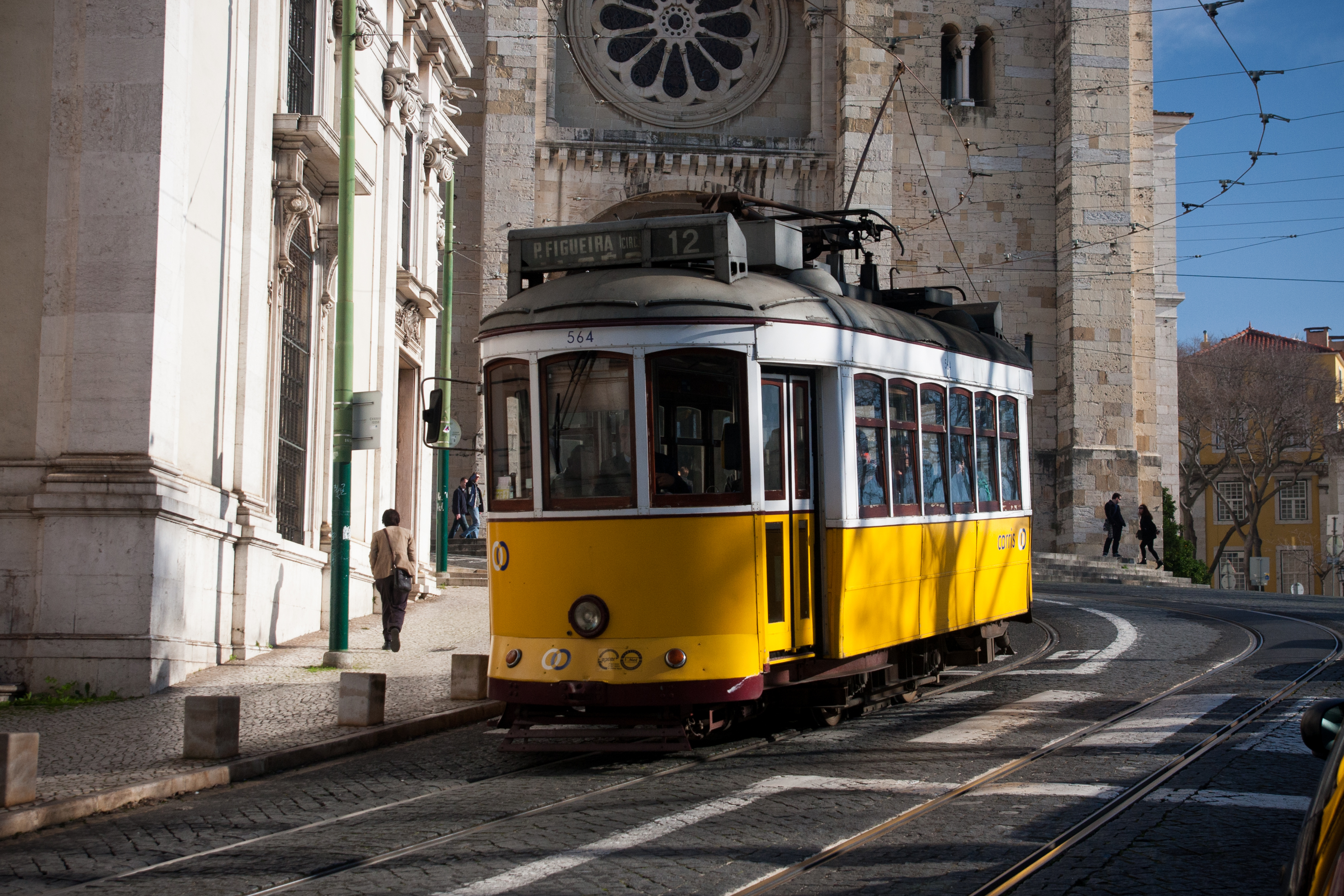 lisboa